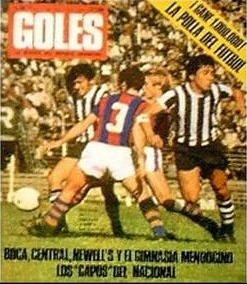 Gimnasia y Esgrima de Mendoza en la revista "Goles".